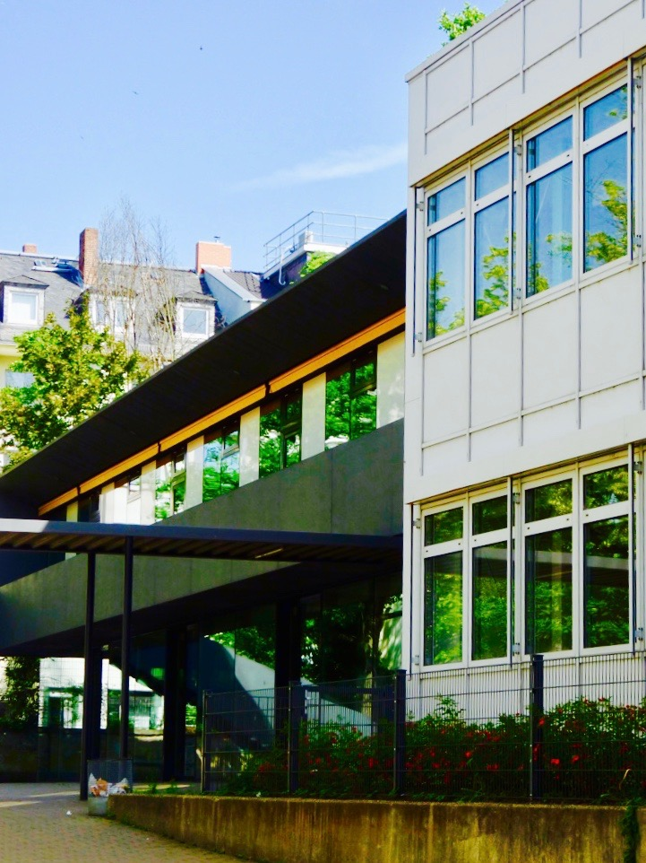 Mensa mit Bibliothek (links) der Helmholtzschule (Gymnasium) in Frankfurt am Main, Teilansicht des IPI-Erweiterungsbaus (rechts). Ansicht von der Brüder-Grimm-Straße in den Schulhof.